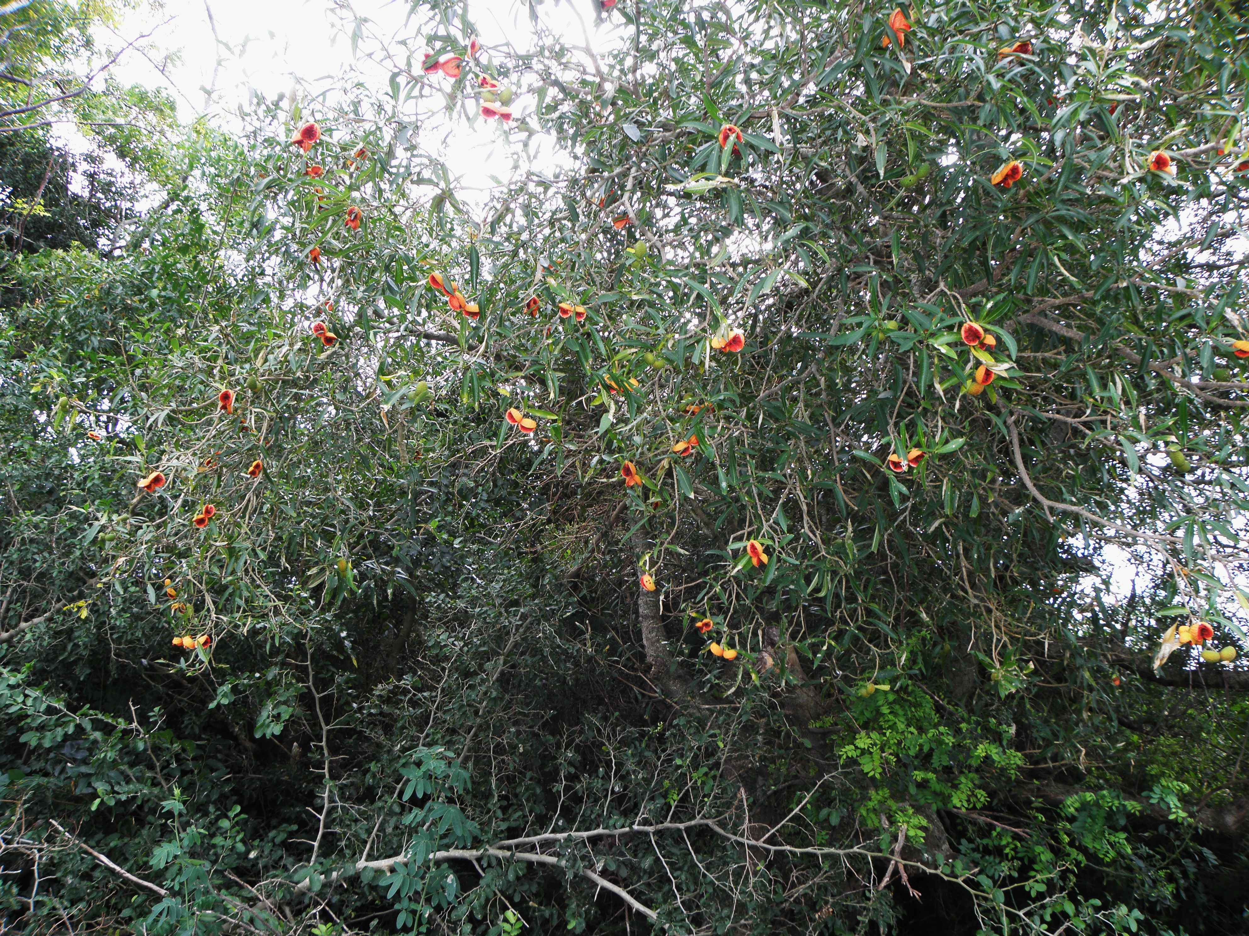 Tabernaemontana catharinensis (Apocynaceae).